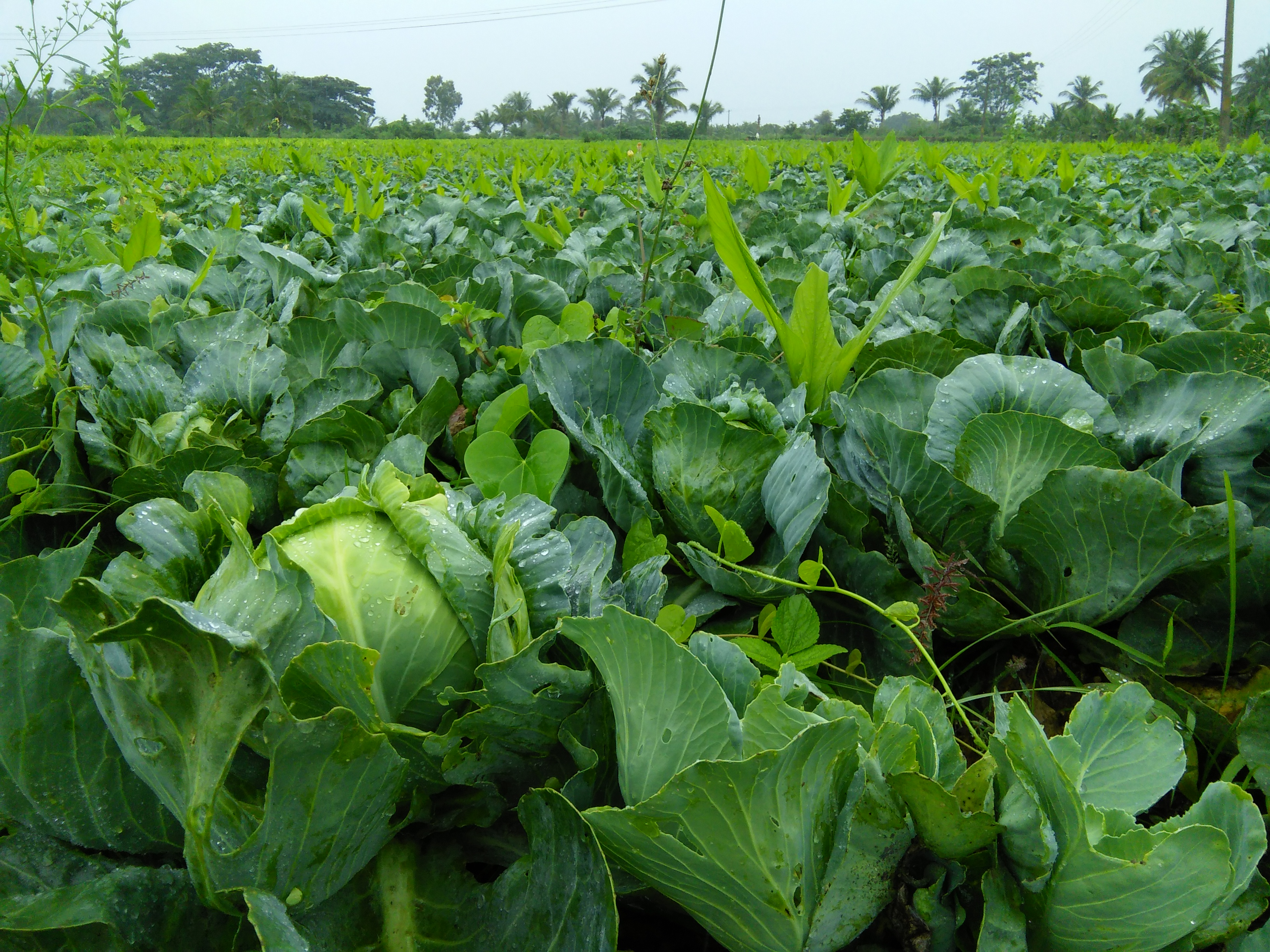 Cabbage cultivation in Chamarajanagar District, Karnataka